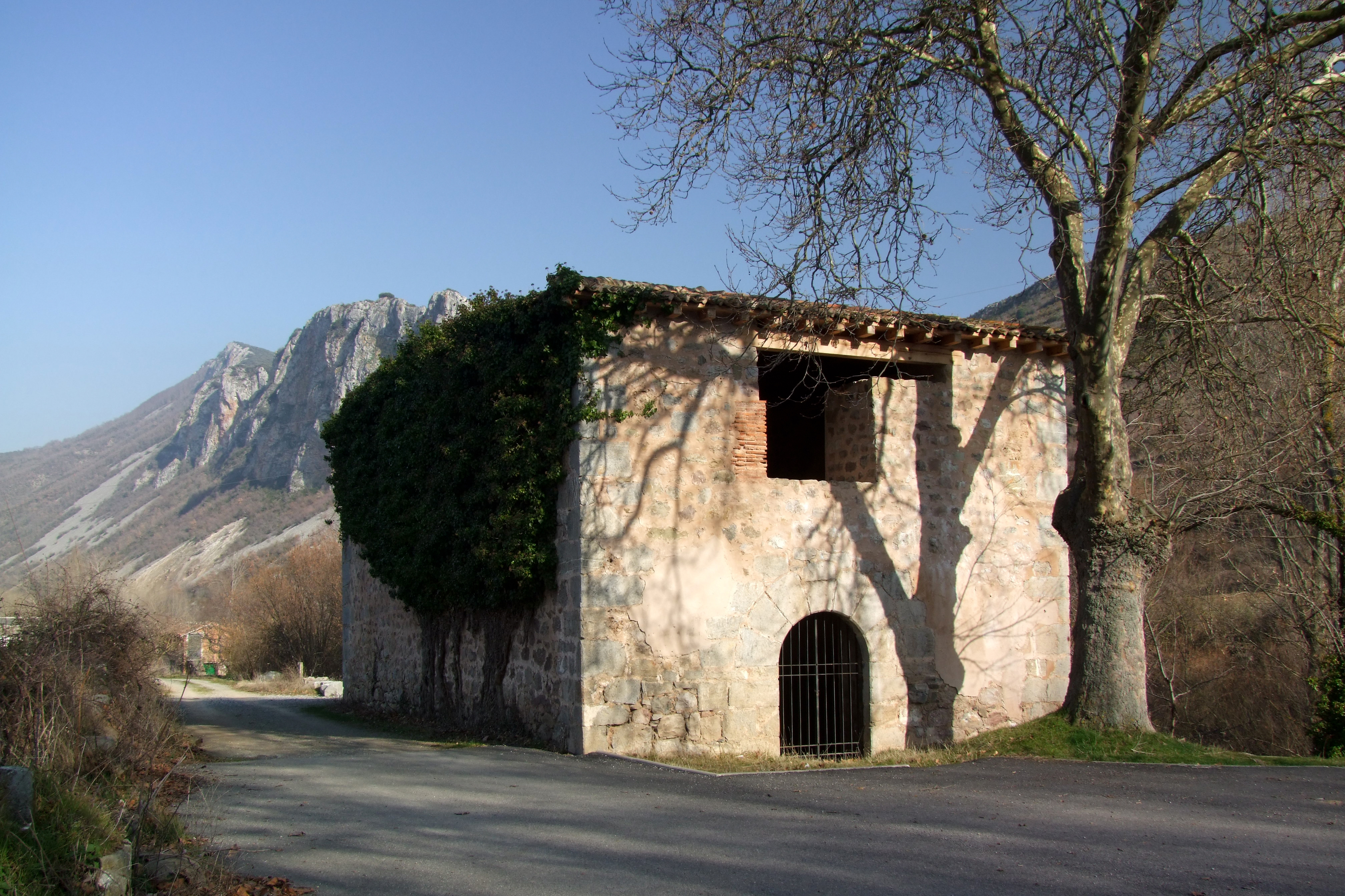 Ermita de San Lázaro en la localidad de Torrecilla en Cameros, La Rioja - España